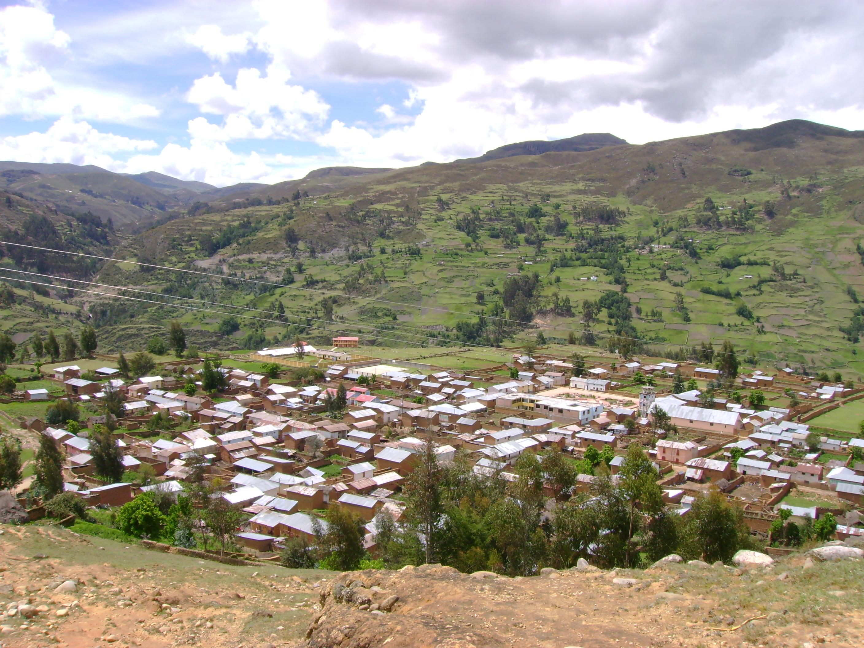 Poblado de Huarín, San Francisco de Asis.